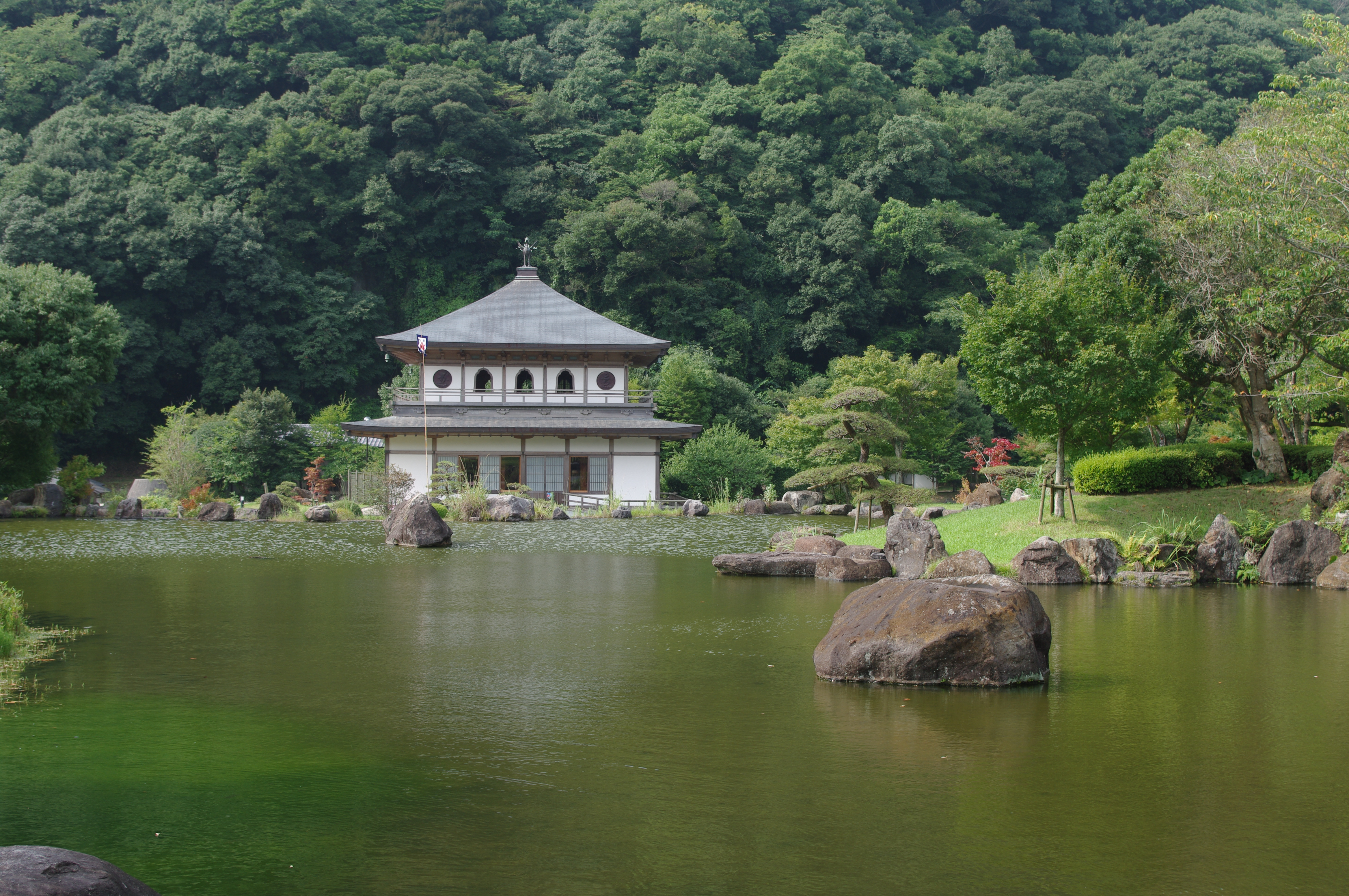 清水岩屋公園の中にある「桜の屋形」